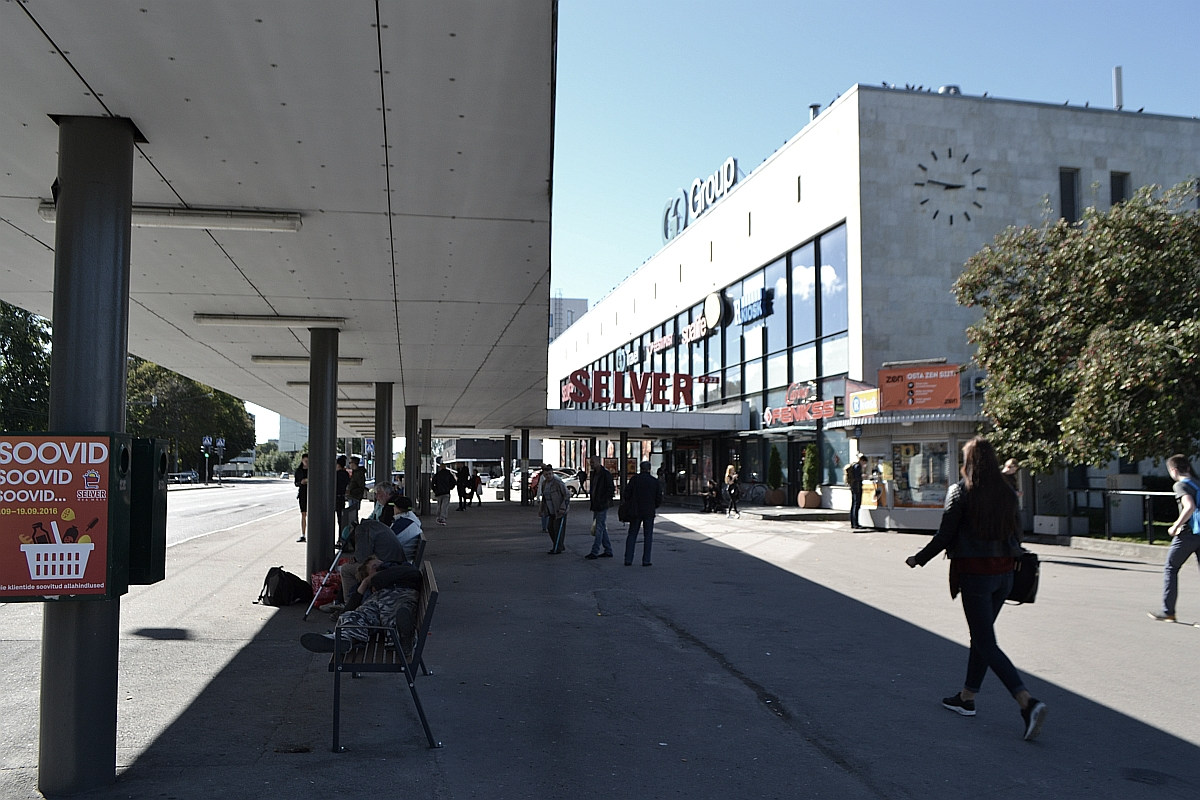 Tallinnas Balti jaamas asuv linnalähedaste rongide reisijate ootepaviljon 2016. aastal